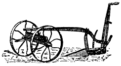 Hjul- eller kärrårder. En årder är ett plöjningsredskap som inte har någon vändskiva.